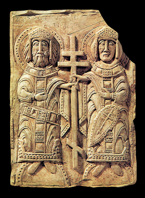 Абразок з выявай Канстанціна і Алены